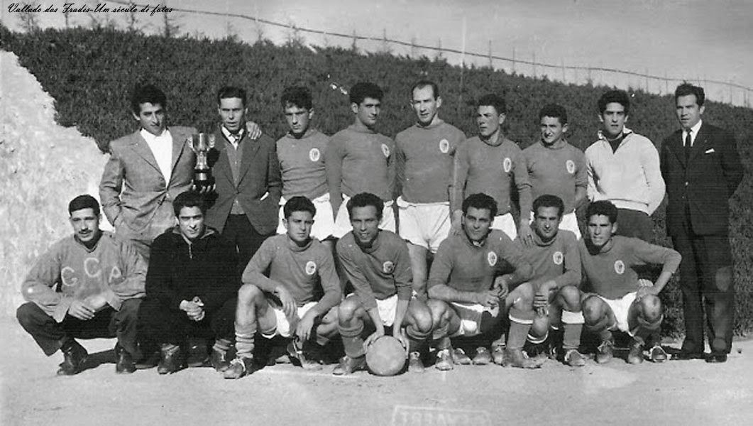 Equipa Ginásio de Alcobaça 1960s